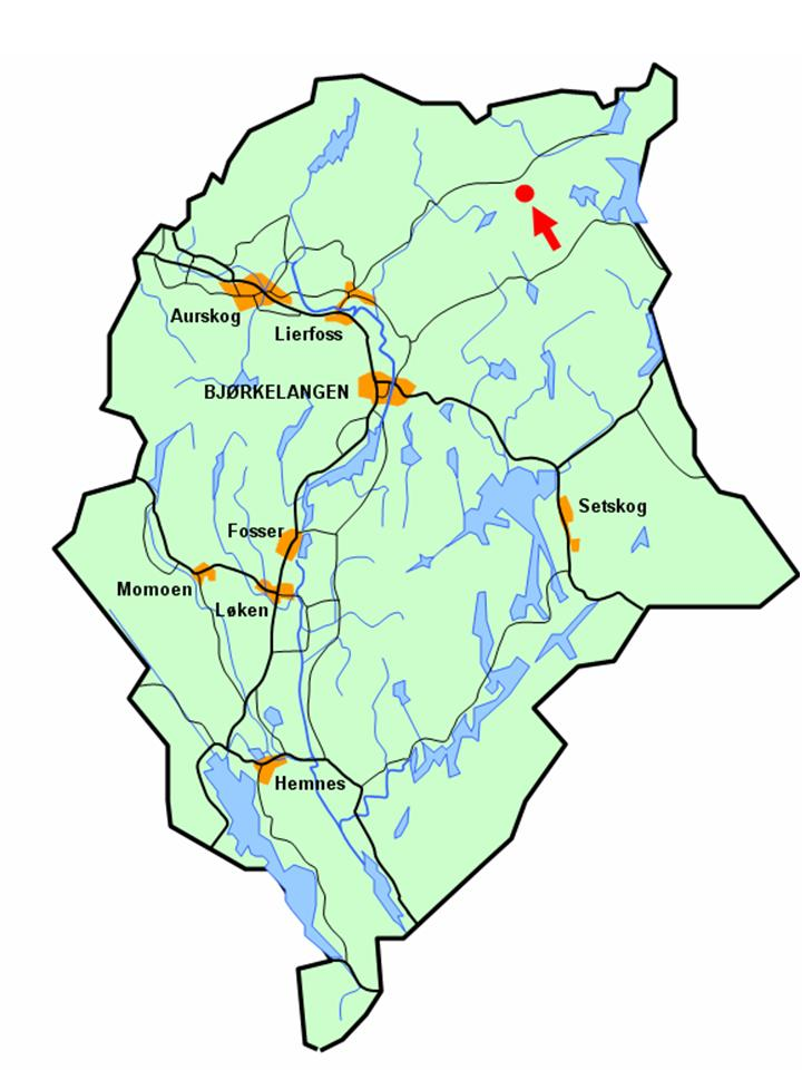 Stilisert kart som angir Piltjern sin lokalisering i Aurskog-Høland kommune.